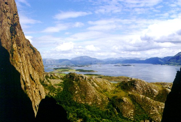 Blick aus dem Torghatten auf norwegische Schären-Inseln